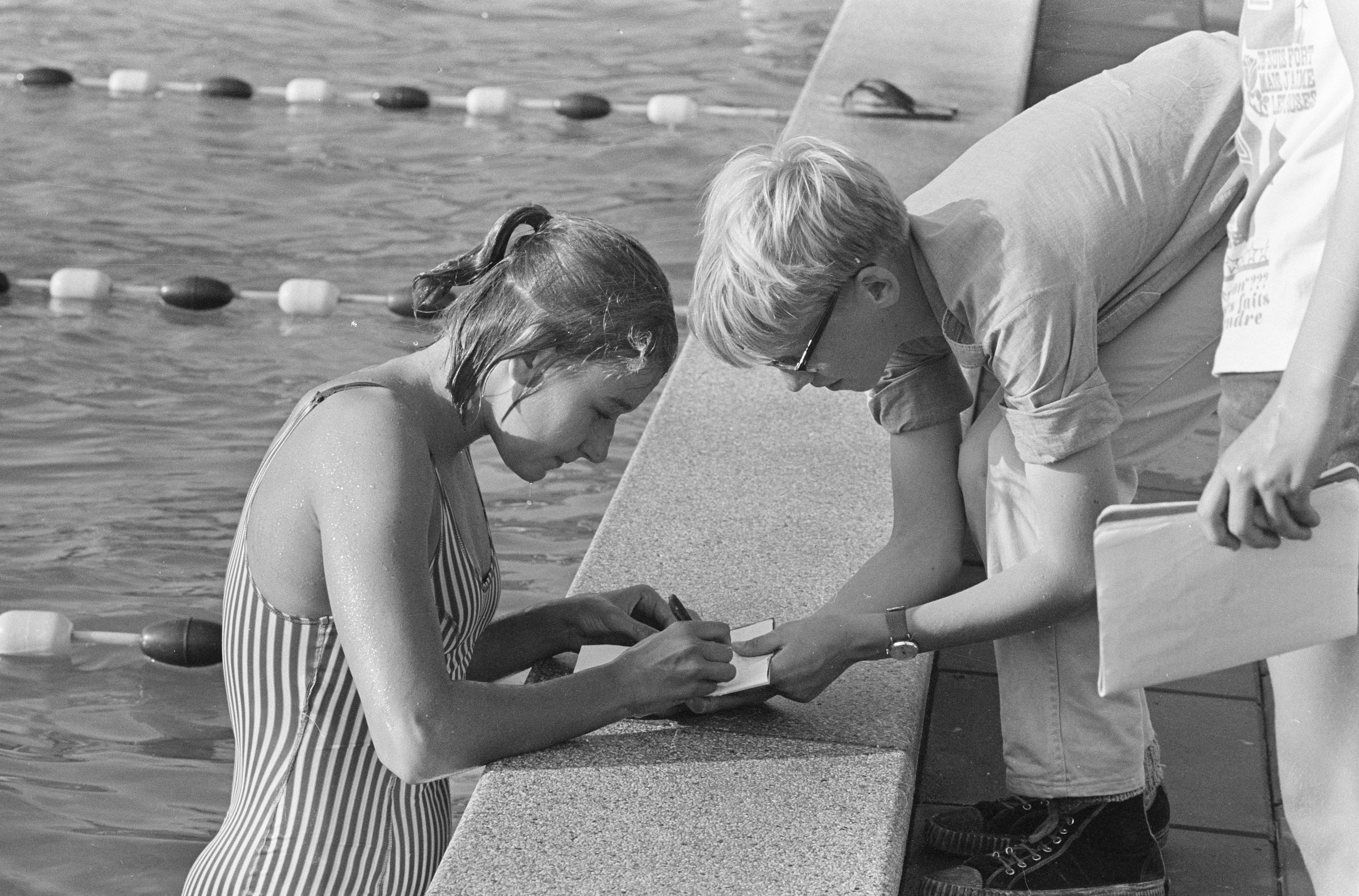 Collectie / Archief : Fotocollectie Anefo Reportage / Serie : [ onbekend ] Beschrijving : Europese Zwemkampioenschappen, Irena Podonycleova (Rusland) geeft handtekening Datum : 18 augustus 1966 Trefwoorden : handtekeningen, zwemkampioenschappen Persoonsnaam : Irena Podonycleova Fotograaf : Kroon, Ron / Anefo Auteursrechthebbende : Nationaal Archief Materiaalsoort : Negatief (zwart/wit) Nummer archiefinventaris : bekijk toegang 2.24.01.05 Bestanddeelnummer : 919-4598